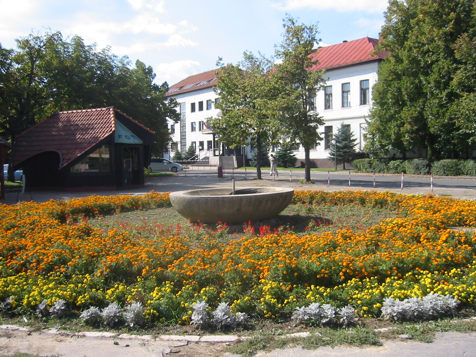 Vranov nad Topľou, Slovakia